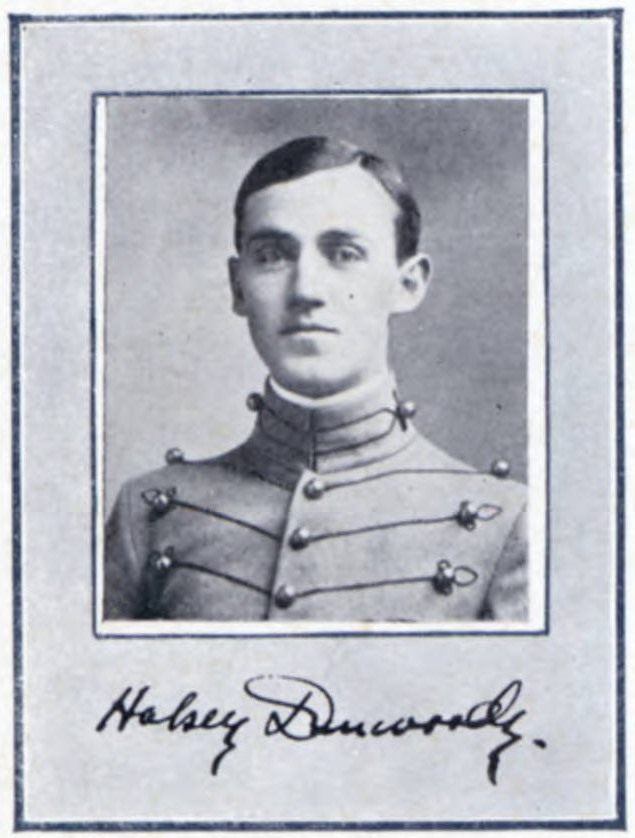 Halsey Dunwoody (West Point)